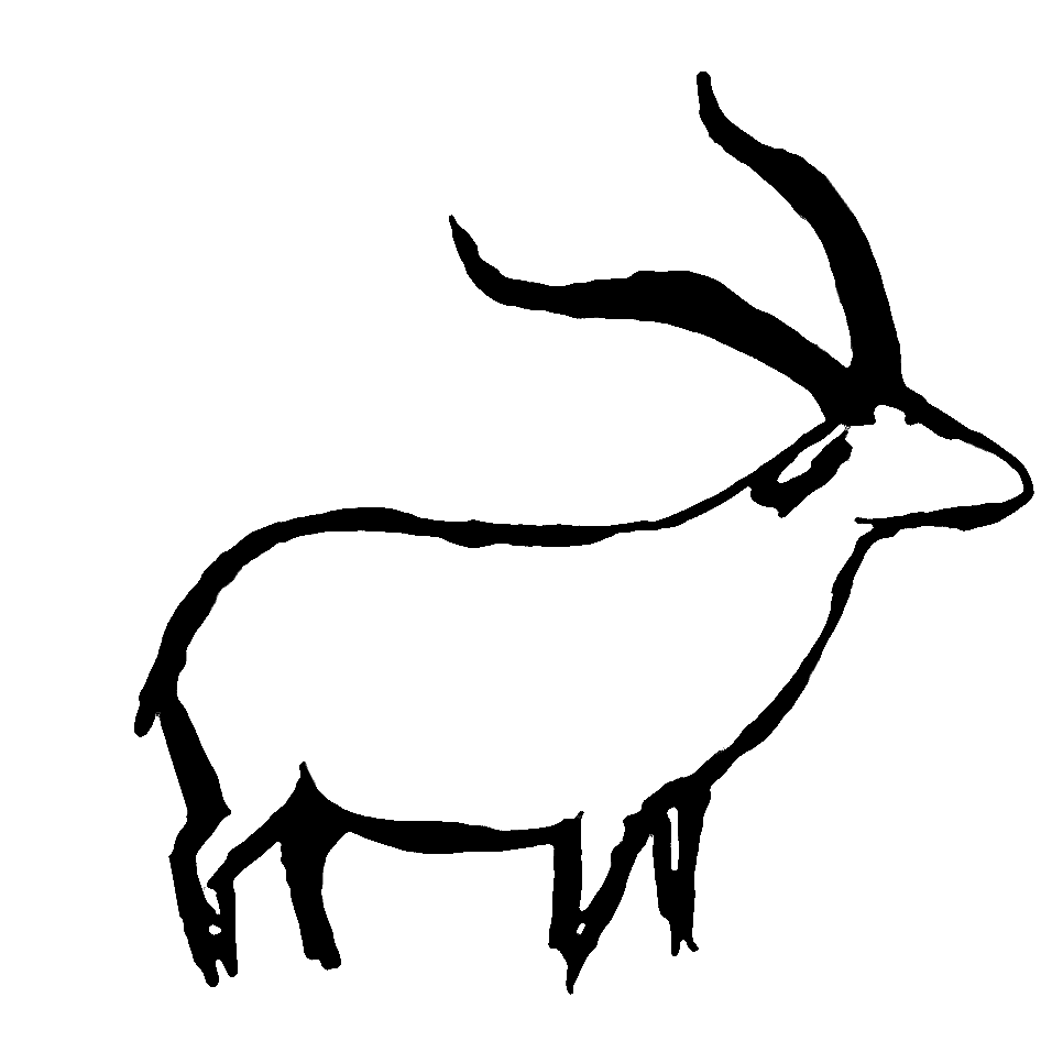 Íbice macho pintado en color negro con trazo modelante en la Galería C (tercer santuario) de la Cueva de La Pasiega, en el monte Castillo, localidad de Puente Viesgo (Cantabria, España)